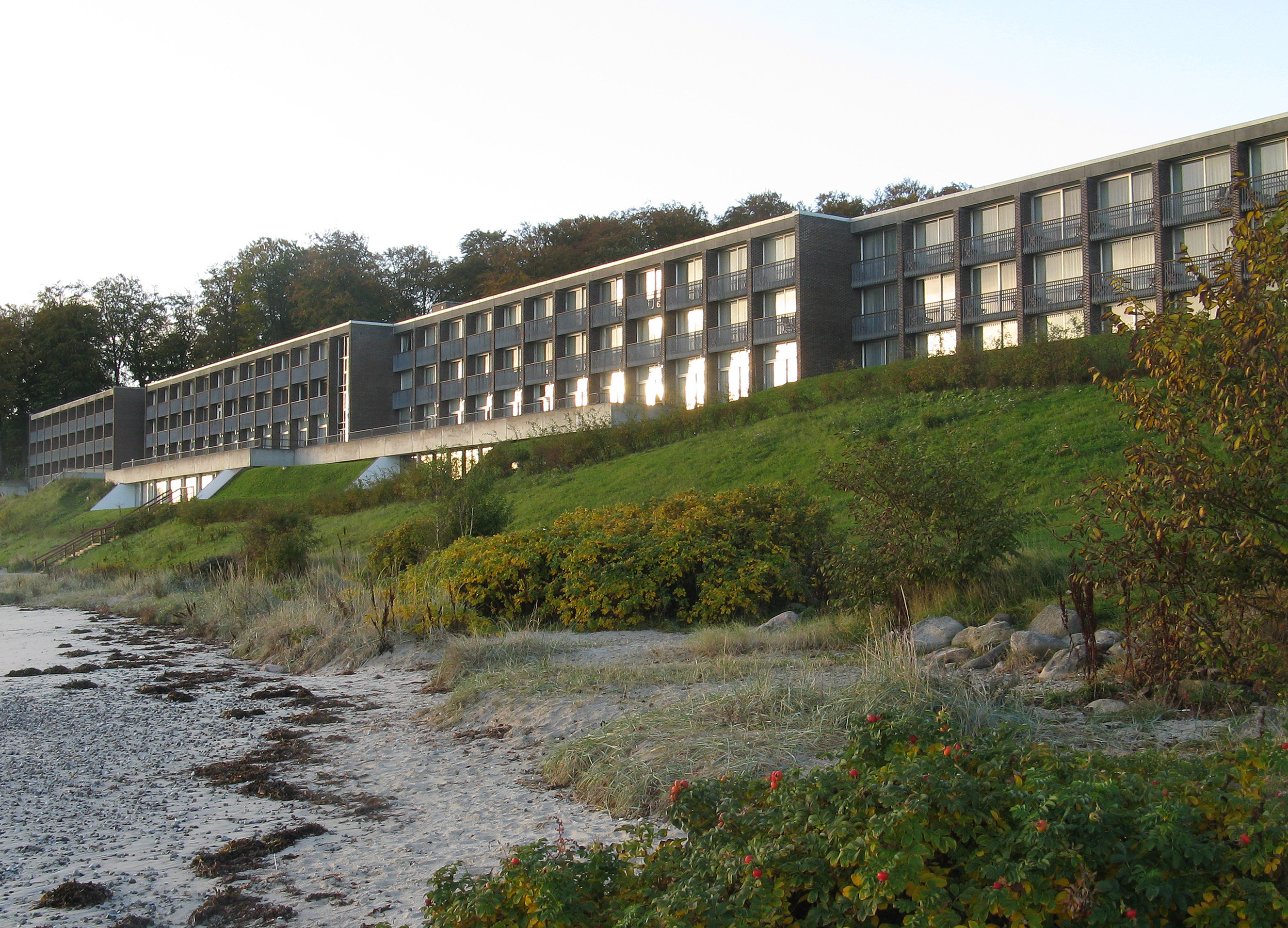 Hotel Marselis ved stranden ved Mareslisborg Skov, i den sydlige ende af Århus